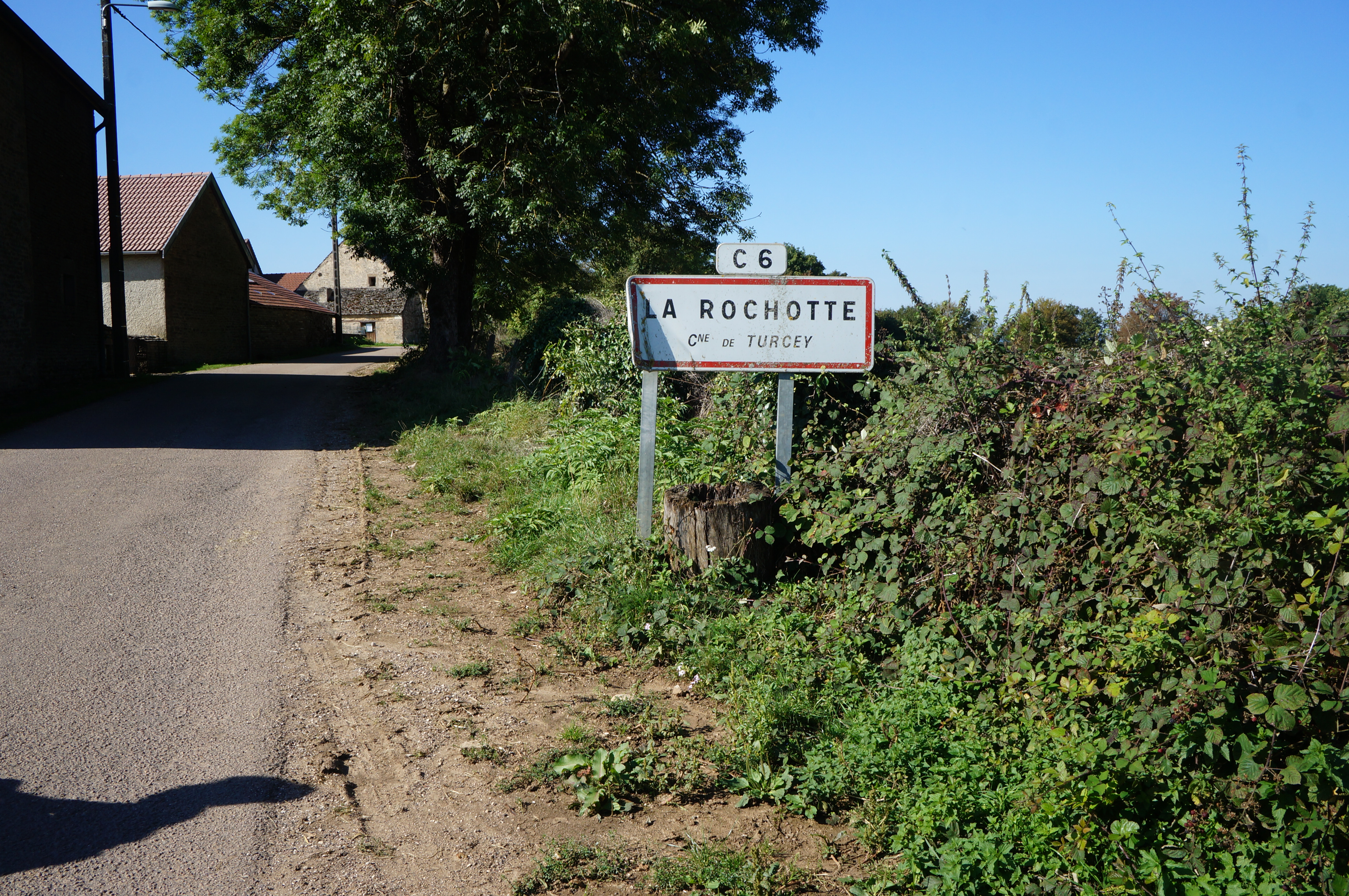 Turcey –le hameau de La Rochotte. Côte-d'Or Bourgogne-Franche-Comté.- Côte-d%27Or Bourgogne-Franche-Comté.- France